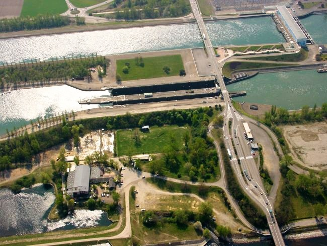 Luftbild vom Rheinseitenkanal (französisch: Grand Canal d'Alsace) mit dem Kraftwerk "Usine Electrique de Vogelgrun" und Schleusenanlage bei Breisach.